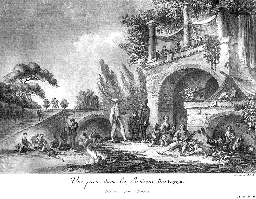 Incisione del Saint Non sui dintorni di Reggio Calabria dove è raffigurata una scena della Commedia dell'Arte con il personaggio reggino di Giangurgolo.